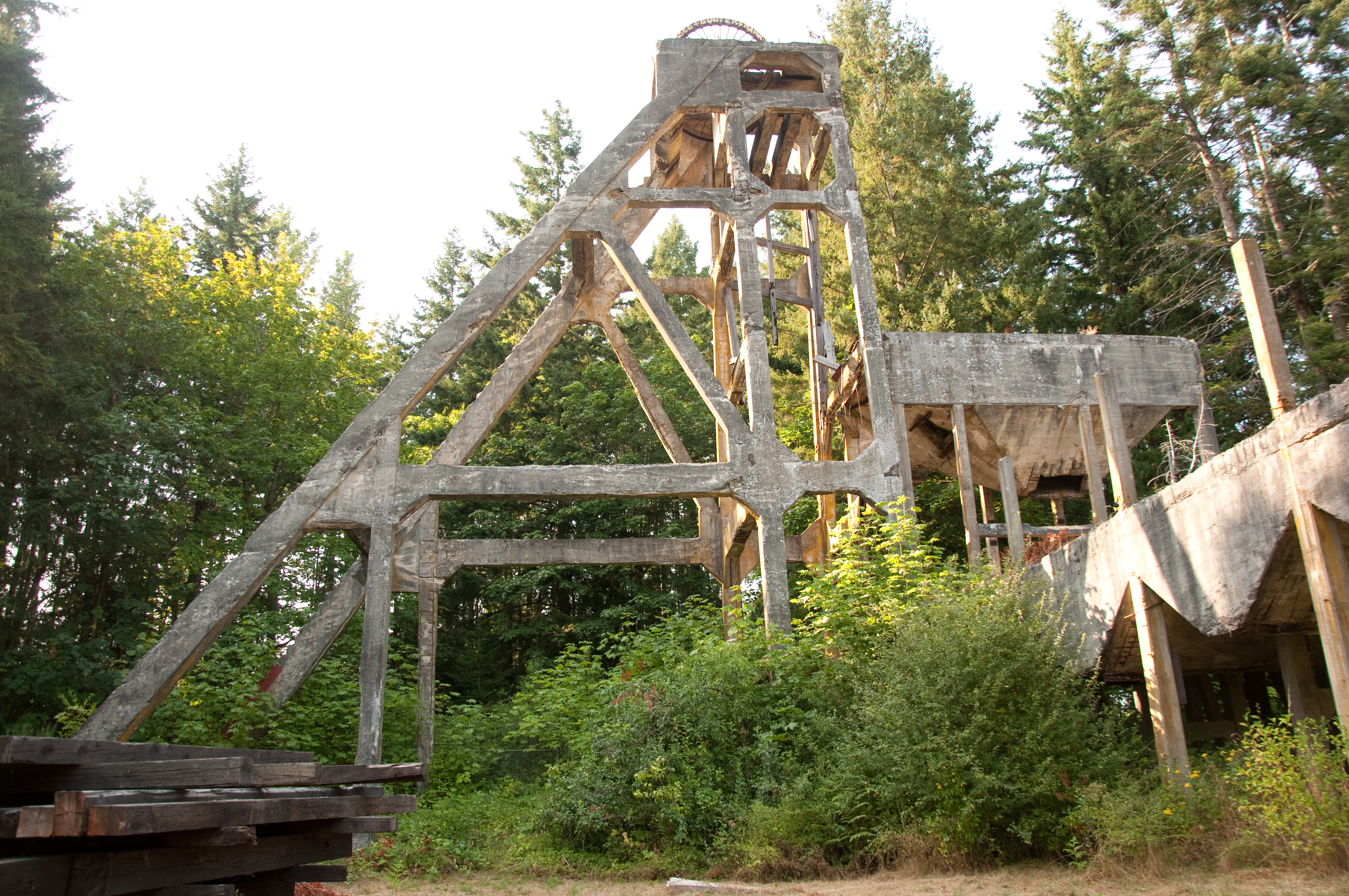 Nanaimo